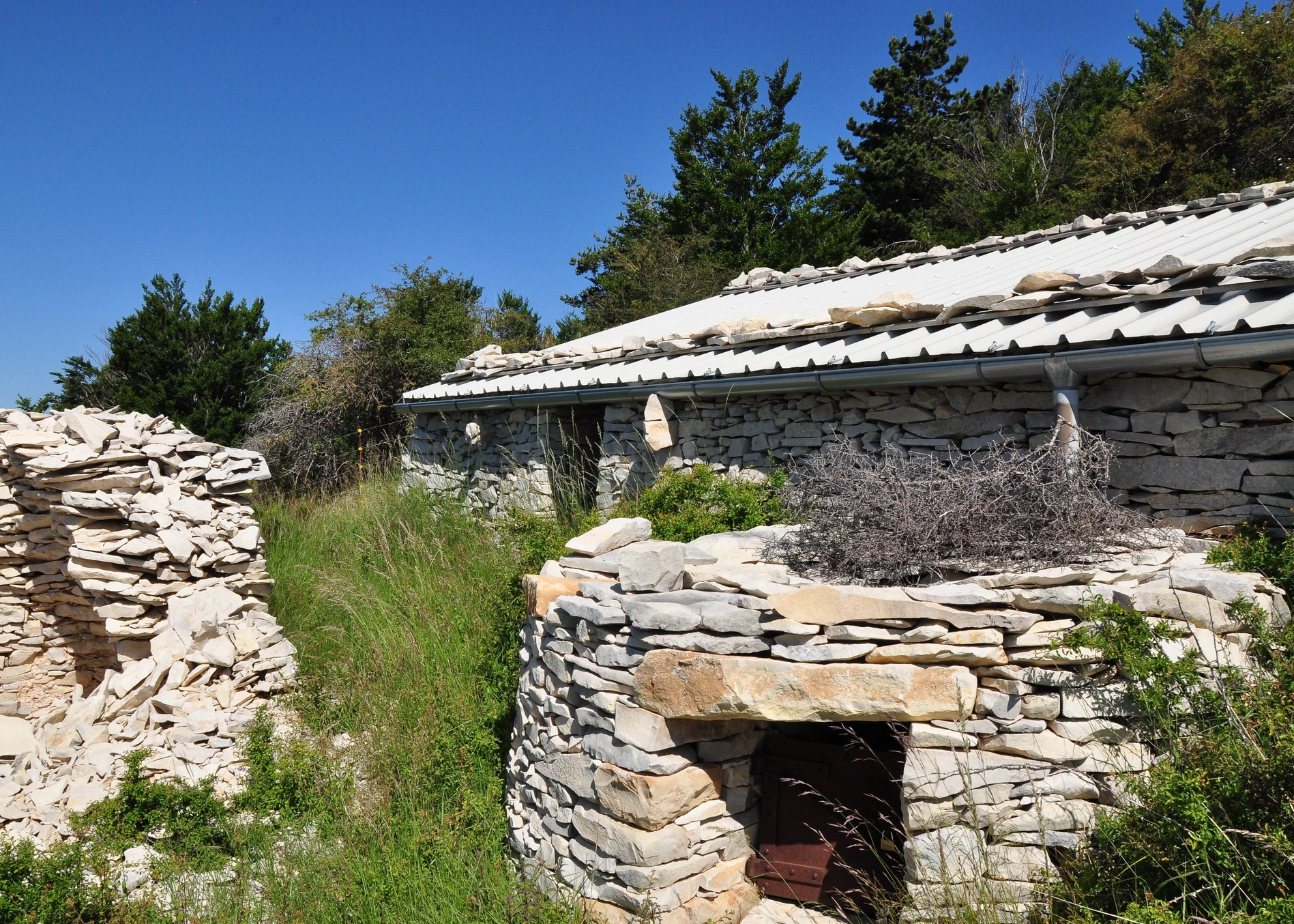 Bories et jas en Haute-Provence